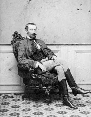 Tisza Kálmán (1830–1902) poltikus, miniszterelnök. Simonyi Antal felvétele (1865 körül)